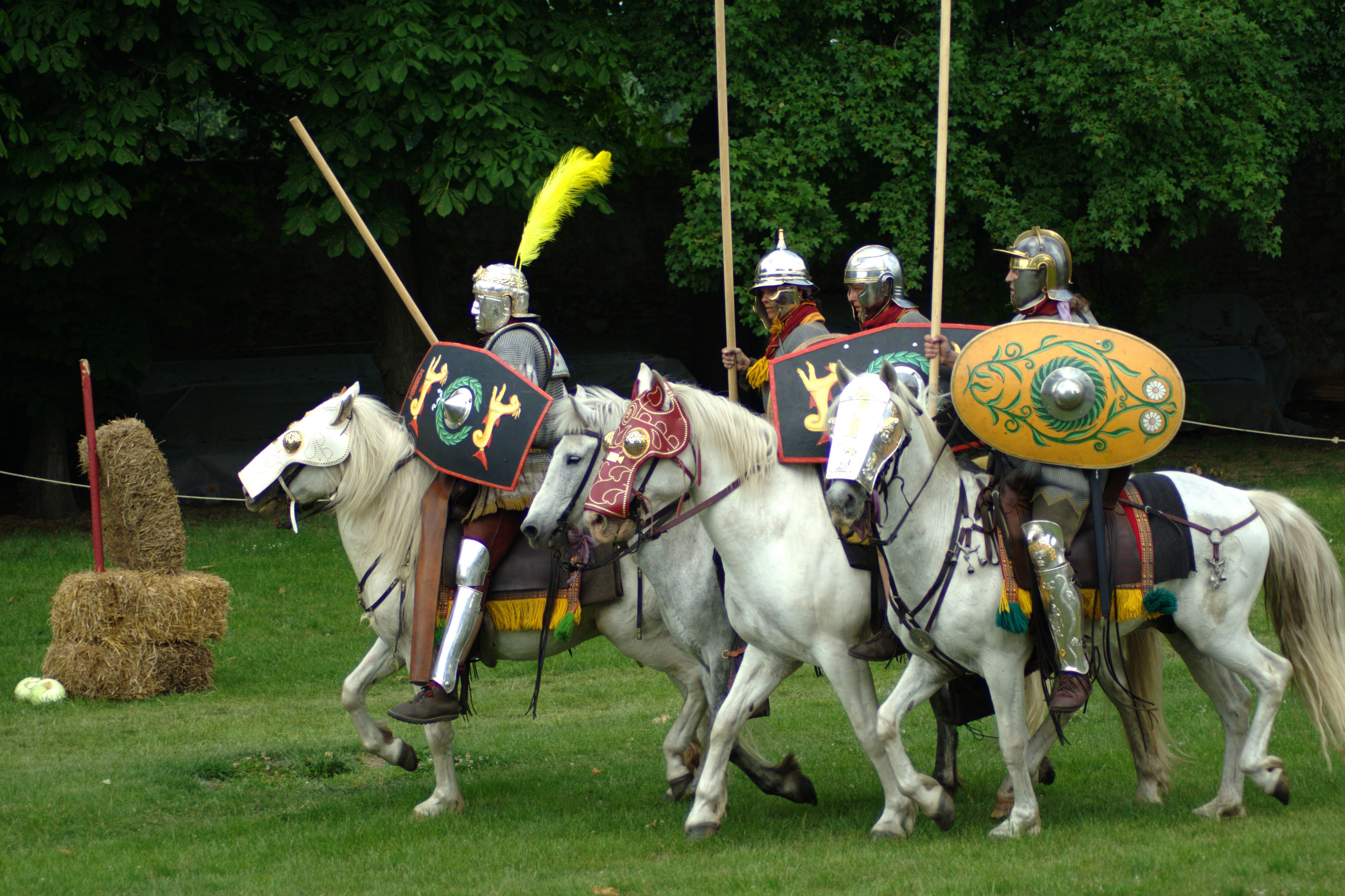 Boarisch: Nåchgschdöde römische Raitarai.